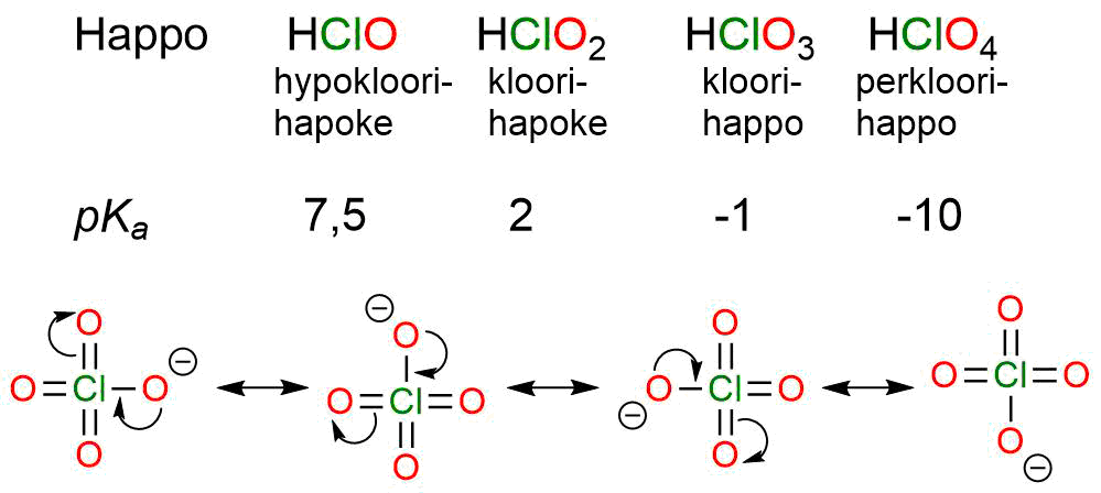 Yllä kloorihappojen pKa-arvoja ja alla perkloraatti-anionin ClO4- neljä resonanssimuotoa